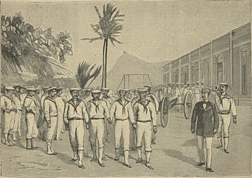 A rendição dos insurrectos (cópia de uma fotografia).